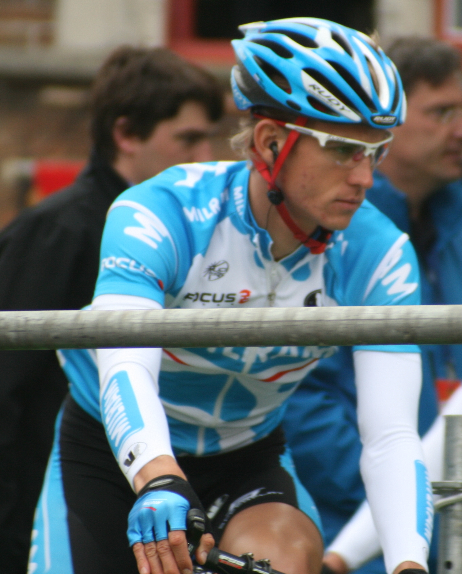 Martin Velits au départ du Tour des Flandres 2009